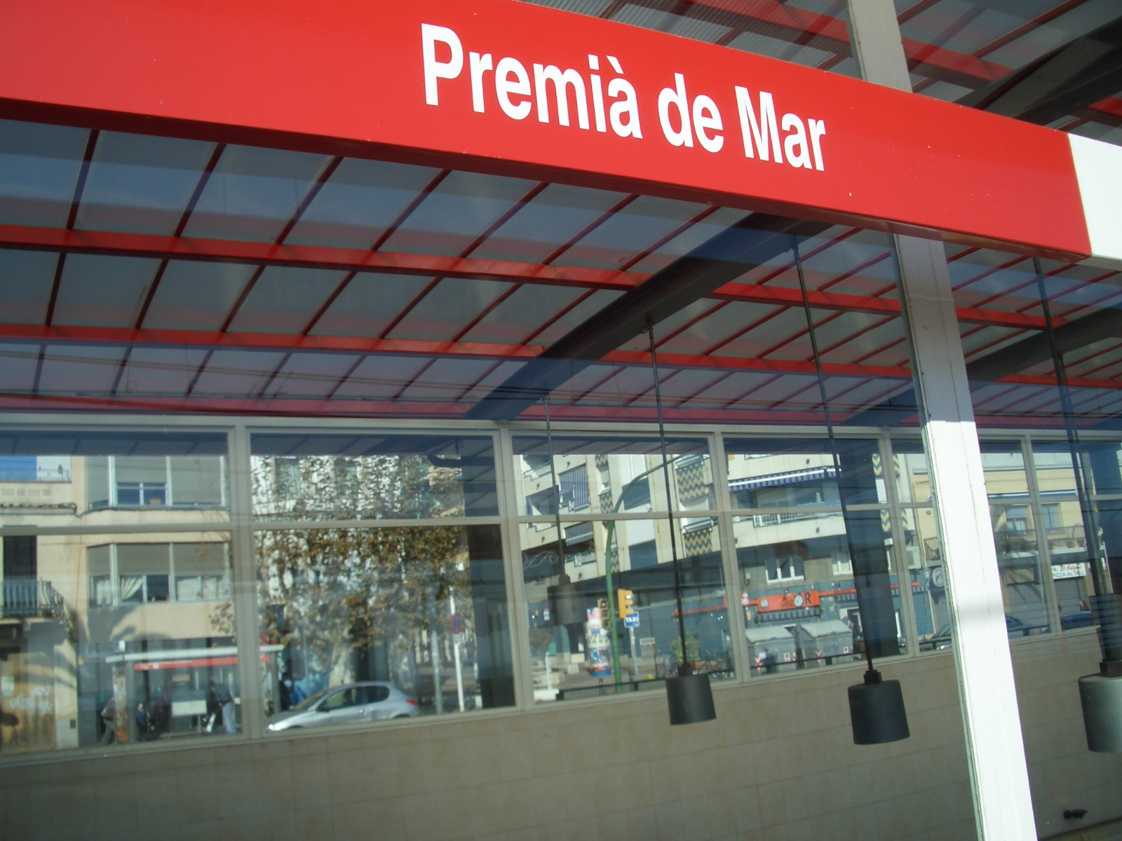 (Train station in Premià de Mar, Barcelona) L'estació de tren i, al fons, la parada de l'autobus per anar a Vilassar de Dalt